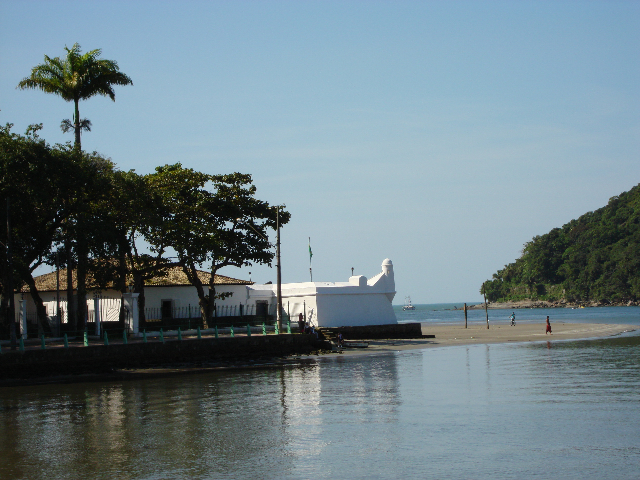 Forte de São João, Bertioga, São Paulo, Brasil